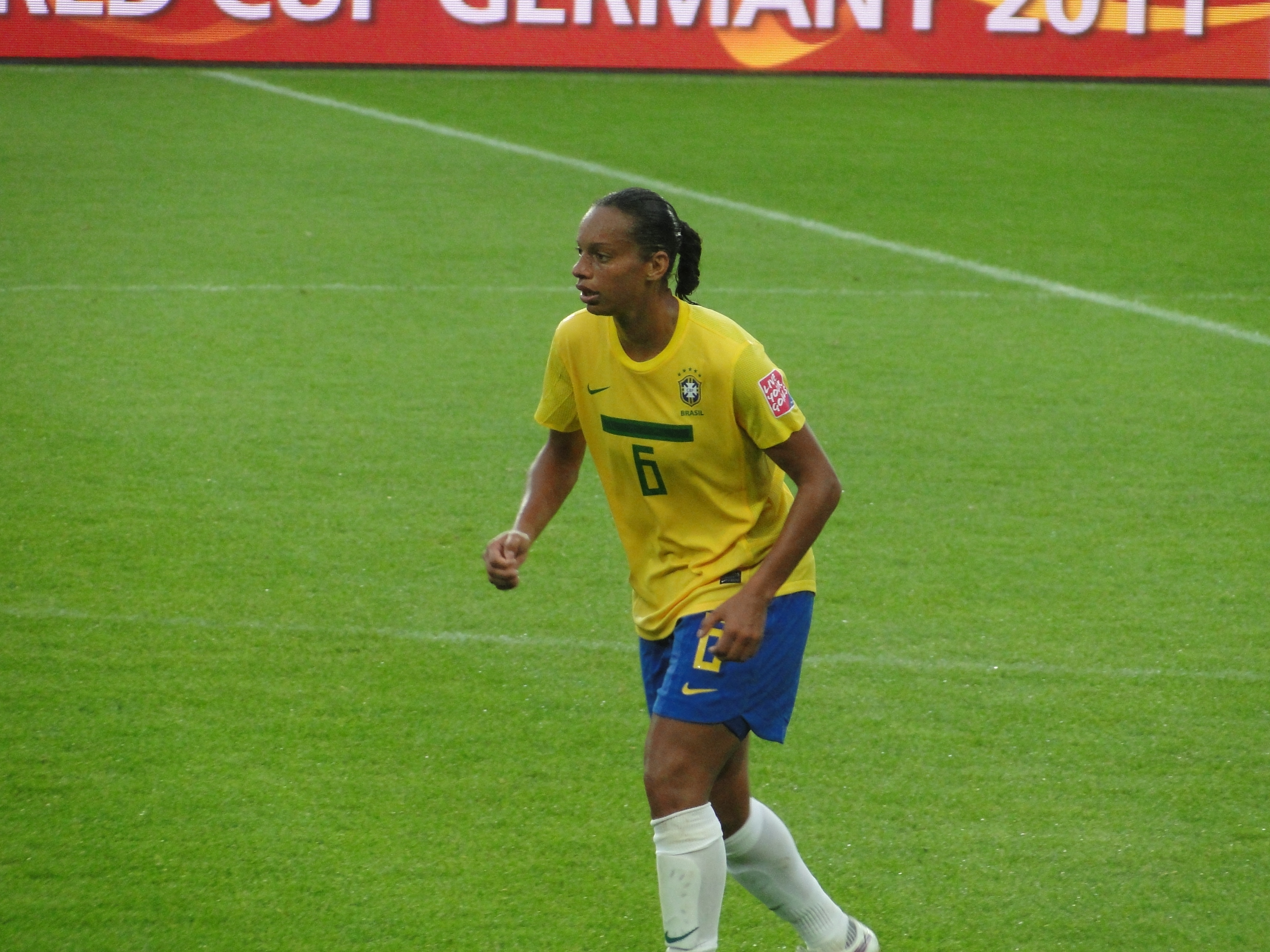 Rosana dos Santos Augusto - Match de phase de groupes de la coupe du monde entre le Brésil et la Norvège le 3 juillet 2011 à Wolfsbourg